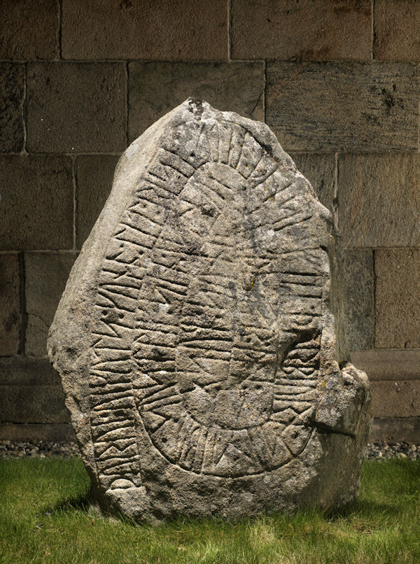 Foto: nationalmuseet ved Roberto Fortuna